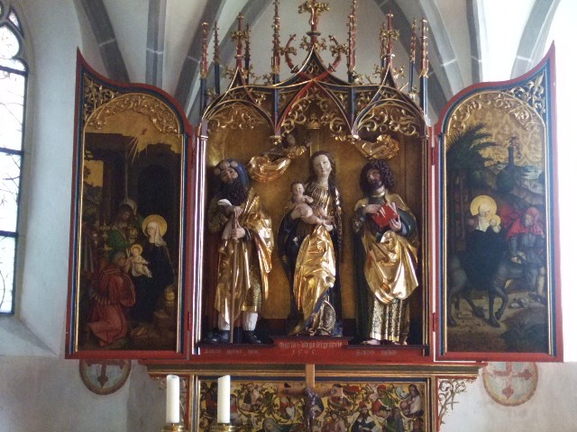 Flügelaltar in der evangelischen Pfarrkirche, Wippingen, Gemeinde Blaustein, Alb-Donau-Kreis